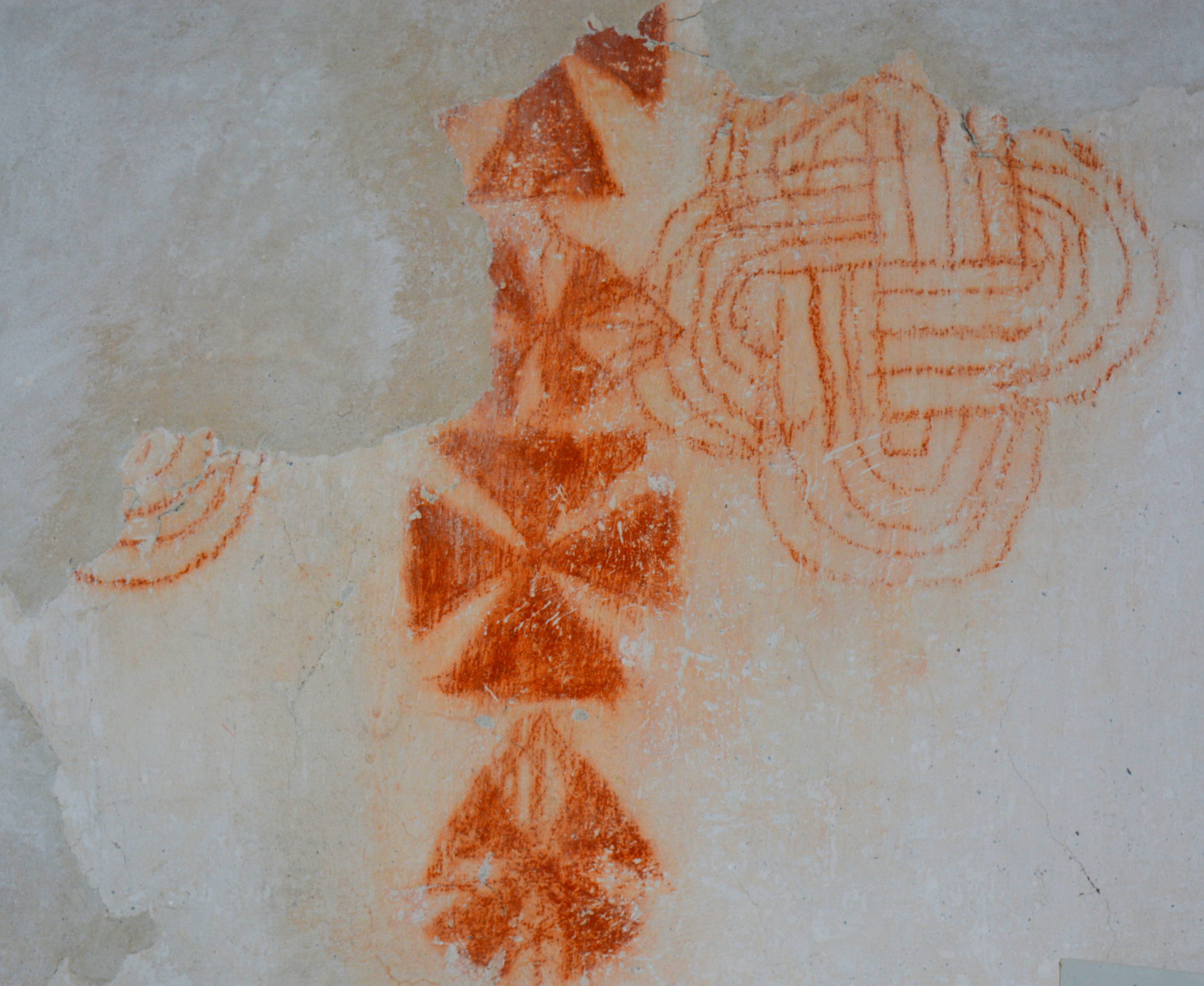 Kerk van Ginnum (fresco)